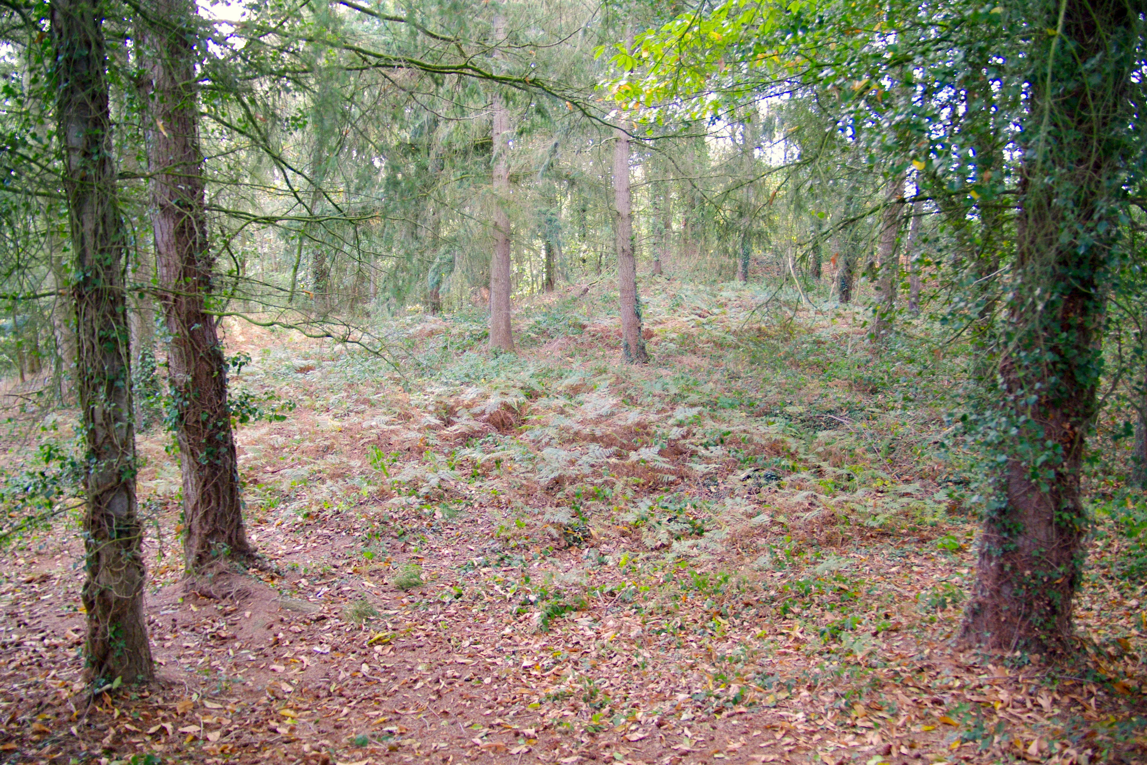 Tumulus dit La Tour Basse, (Classement, 1934) .